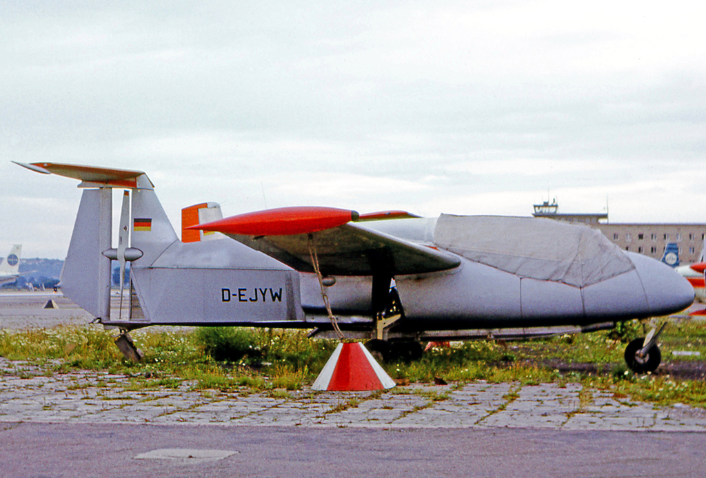 Rhein Flugzeugbau RFB RW 3.P75 D-EJYW at Stuttgart Echterdingen in 1965